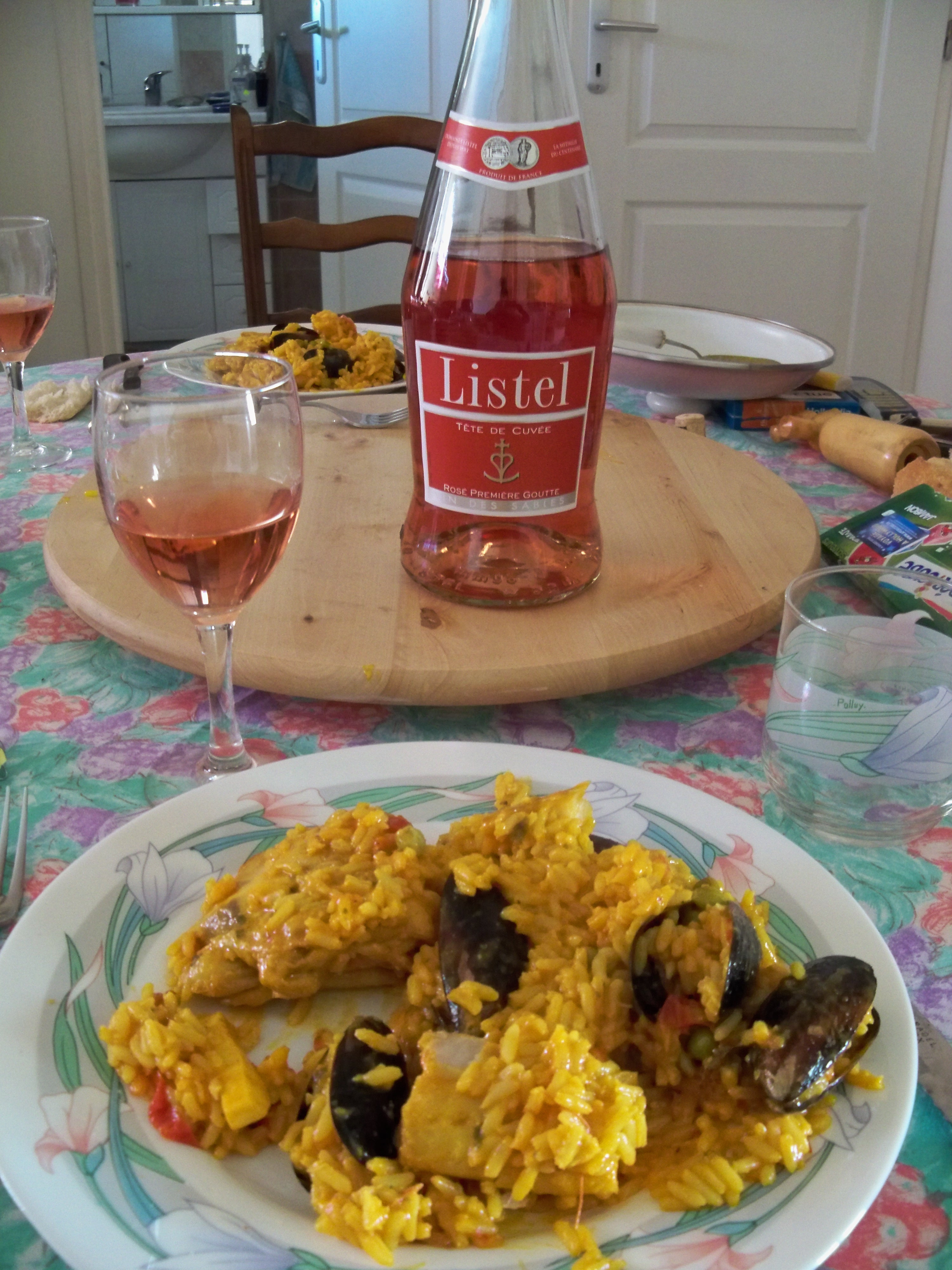 Bouteille de Listel rosé et paella